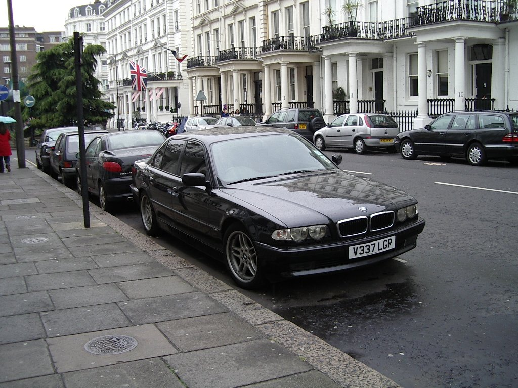 BMW E38 7 series